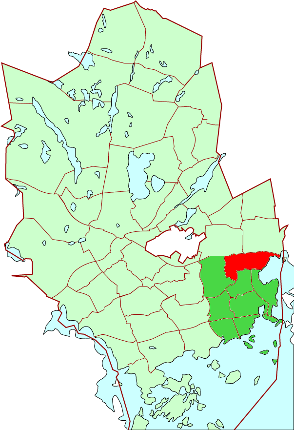 Laajalahti/Bredvik district in Espoo city, Finland